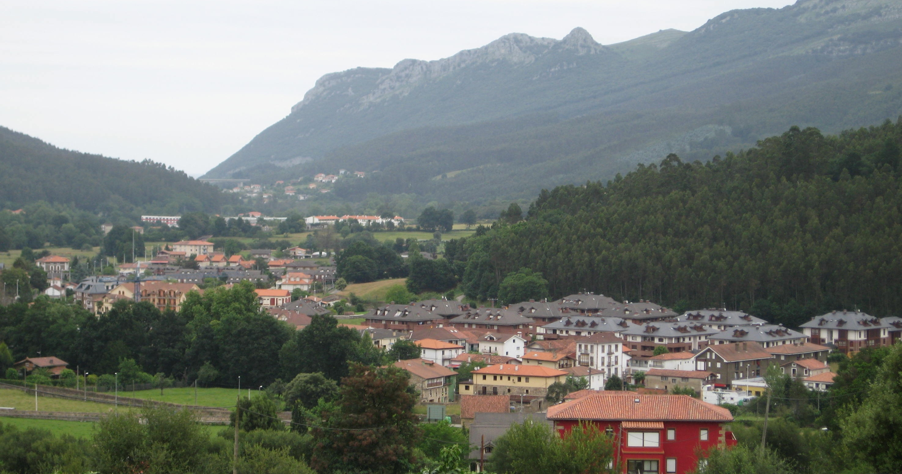 Barrios de El Puente y Rioseco en el Valle de Guriezo, Cantabria, España.